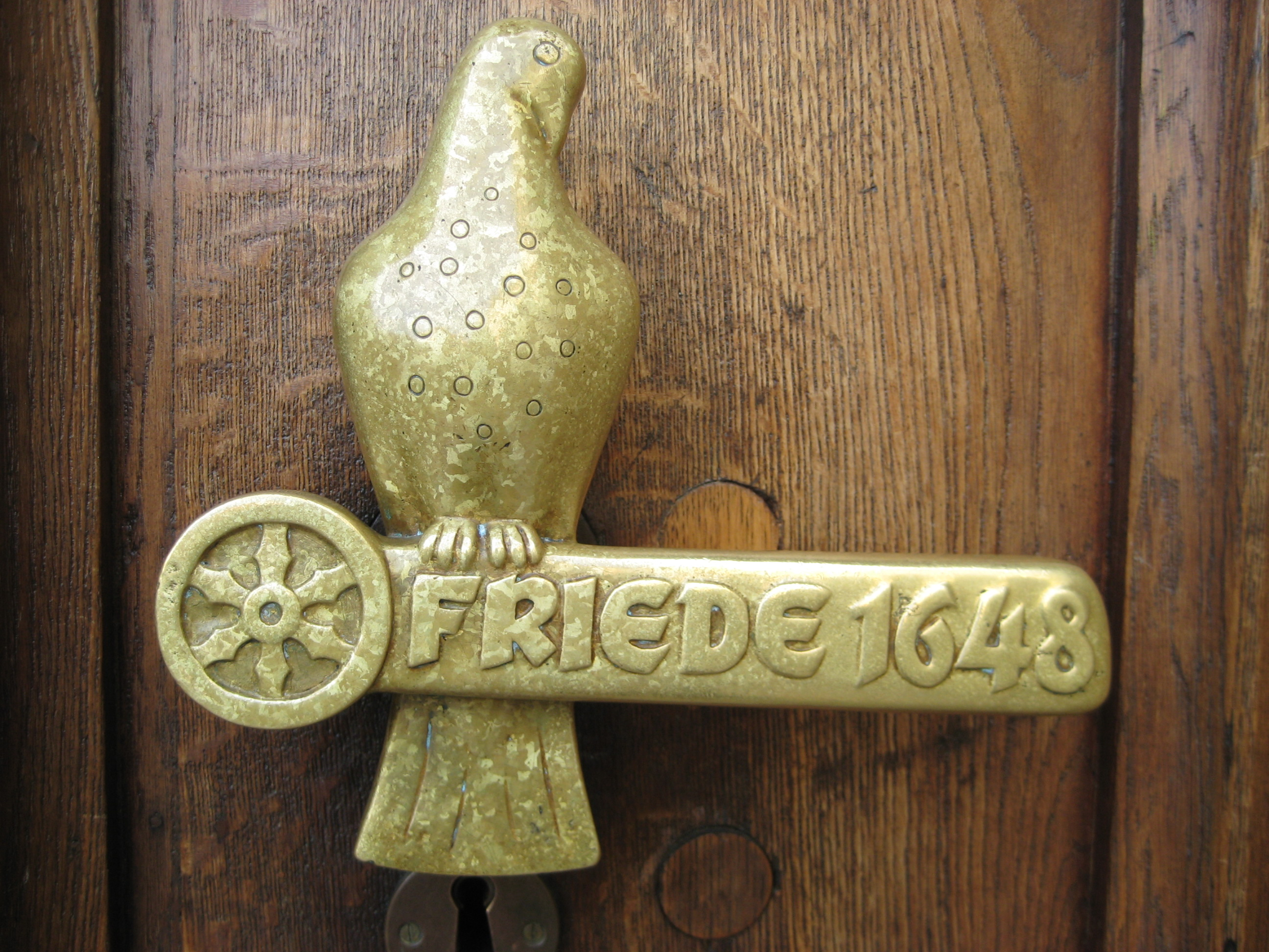 "Türgriff Friede 1648" am Rathaus Osnabrück von Fritz Szalinski (1905-1978), Bronze, 1963